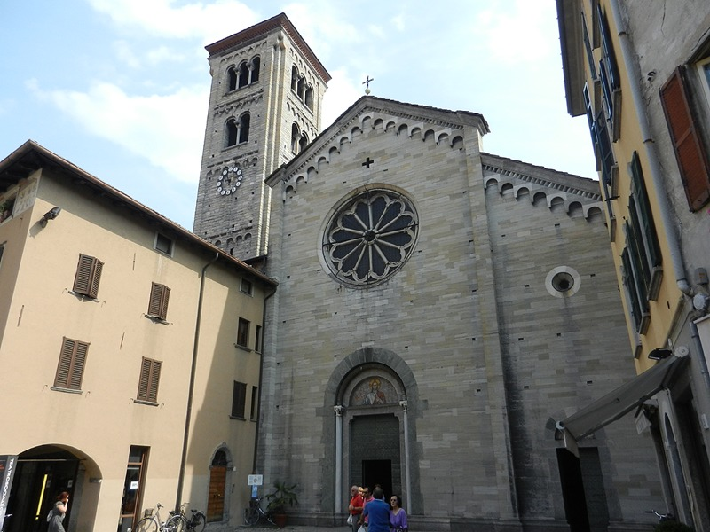 Como - Basilica di S. Fedele